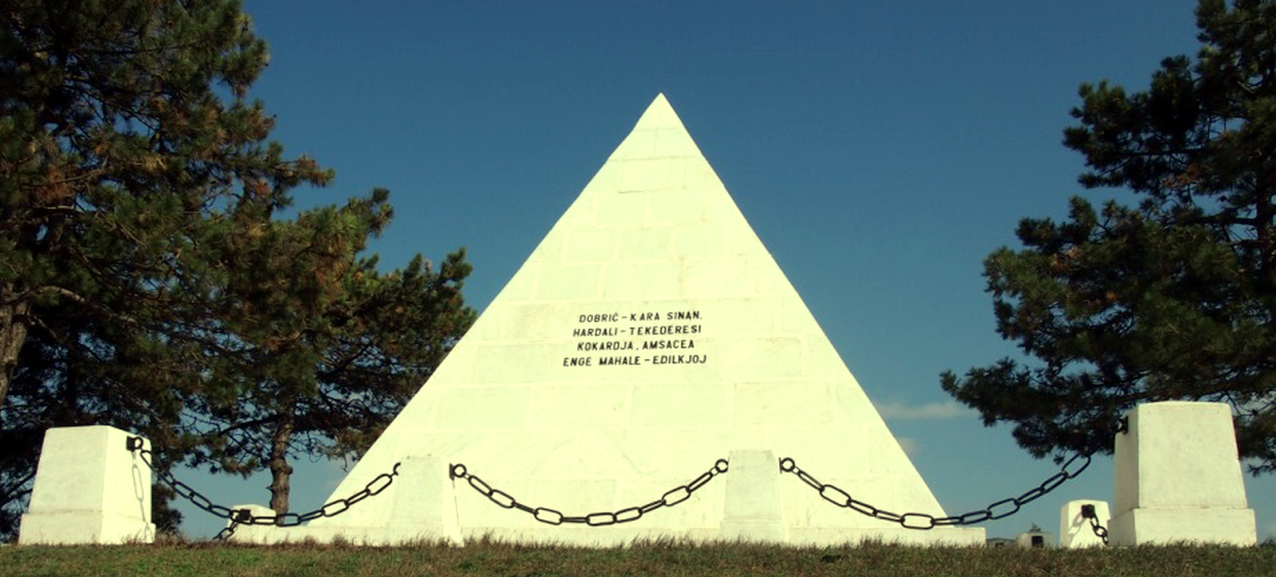 D - Divizia 1 Voluntari sarba - Mausoleu Medgidia